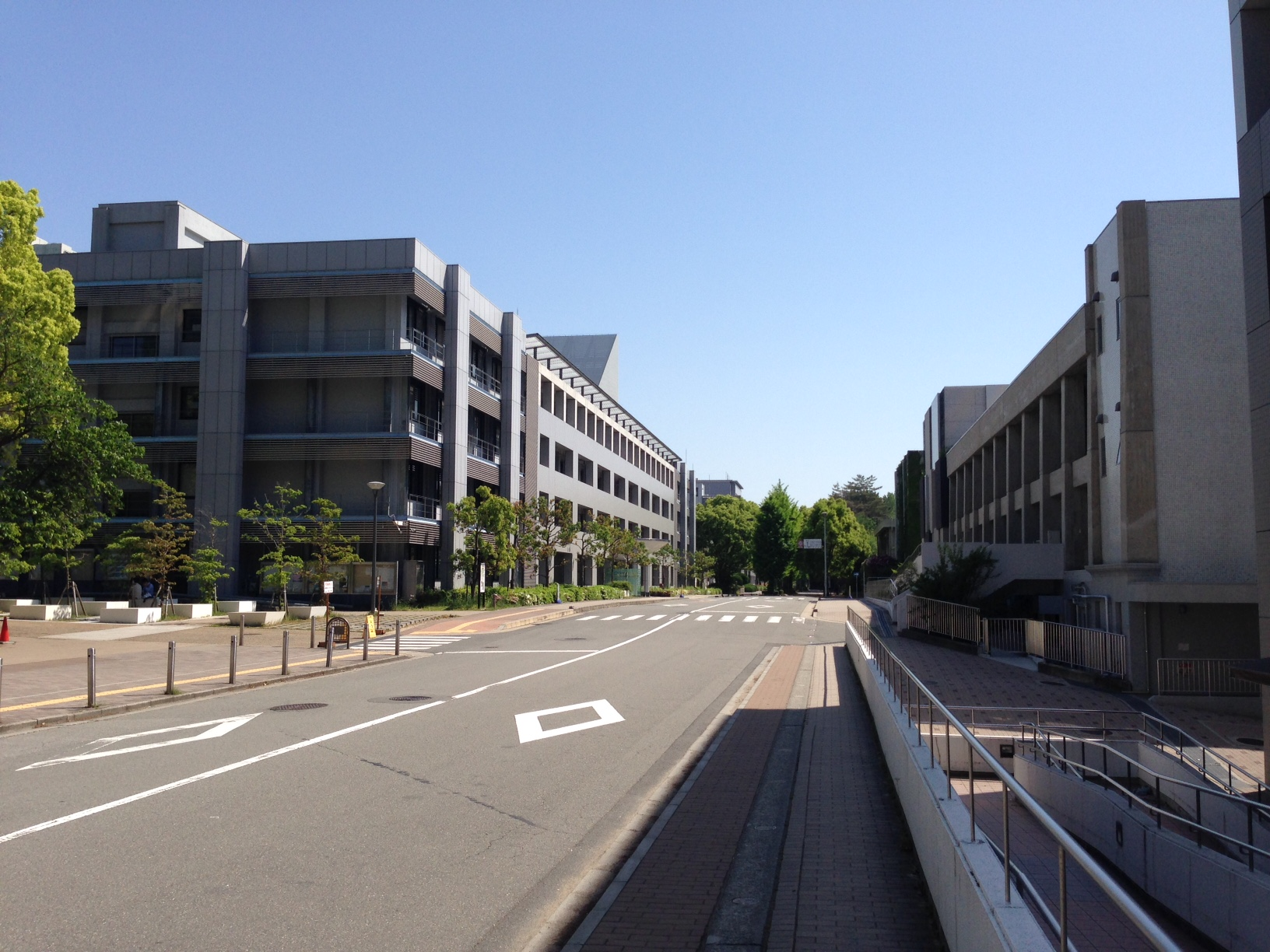 大阪大学豊中キャンパス構内通り